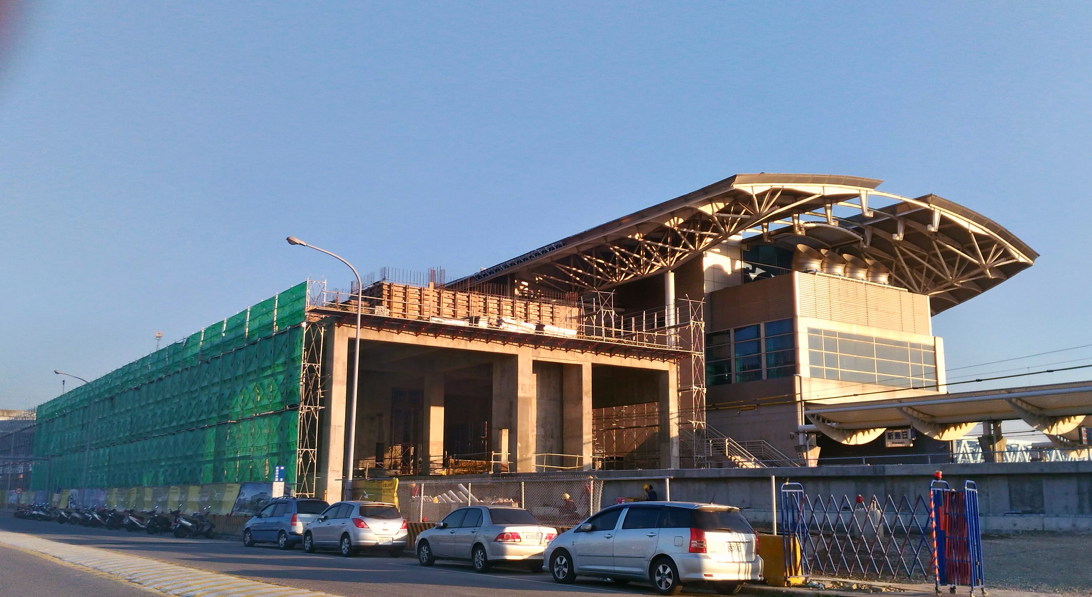 臺中捷運新烏日站2016年12月工程，後方為共站的臺灣鐵路管理局新烏日車站。